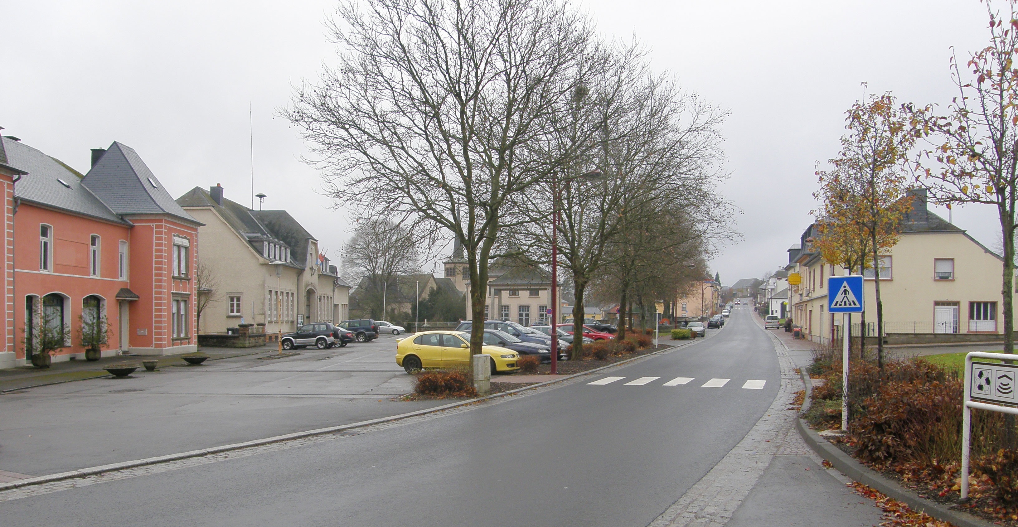 D'Haaptstrooss laangscht d'Gemeg zu Rammerech.